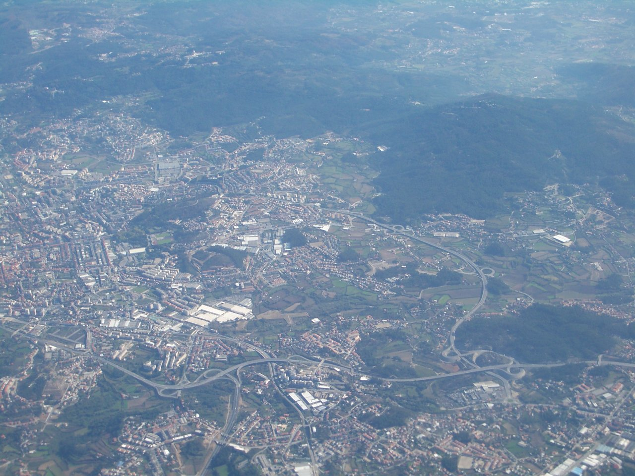 Braga